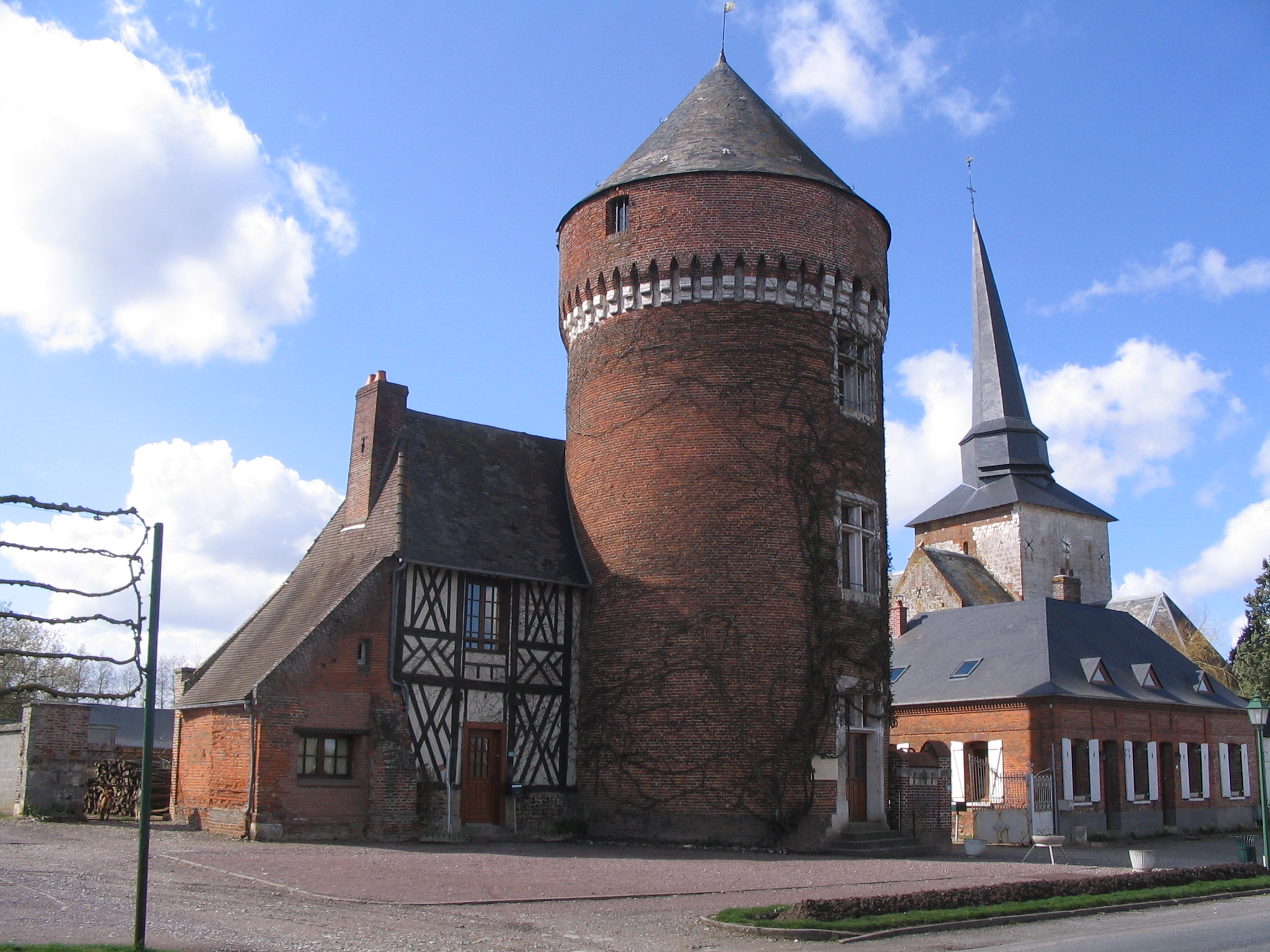 Seine-Maritime, Saint-Léger-aux-Bois, La tour du Duc de Mailly